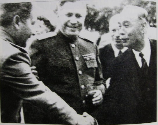 1946. 5 제1차 미소공위 당시 여운형 (소련측 대표들과 함께), Over 65years. 출처는 Book - ,이기형 지음. -, 서적에 있는 사진 촬영함.(User:Sienic's Camera)